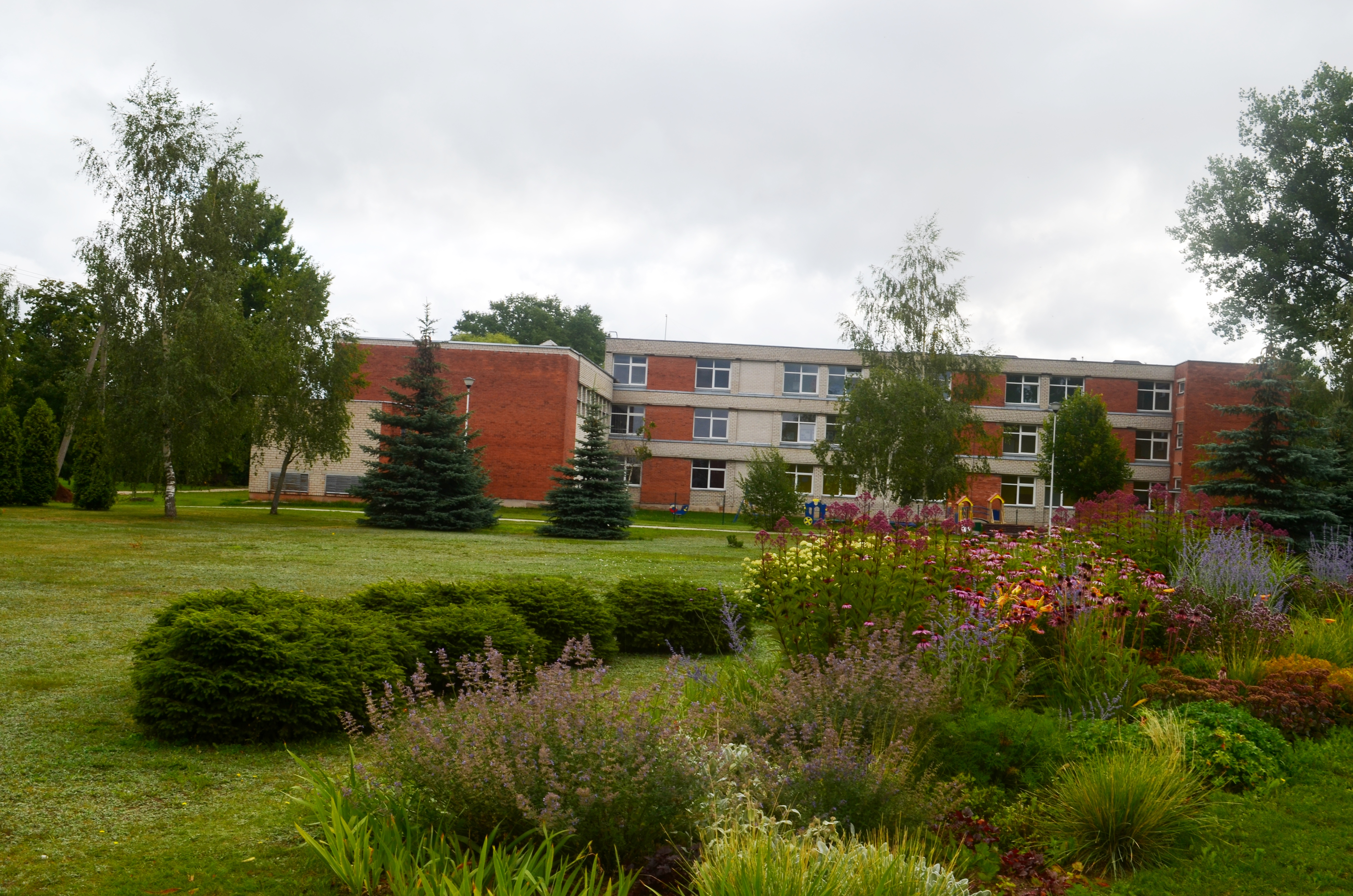 Žeimių mokykla, Jonavos raj.